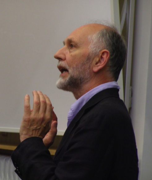 Prof Gregory Currie esinemas Tartus narratoloogia konverentsil end keemiahoone ringauditooriumis